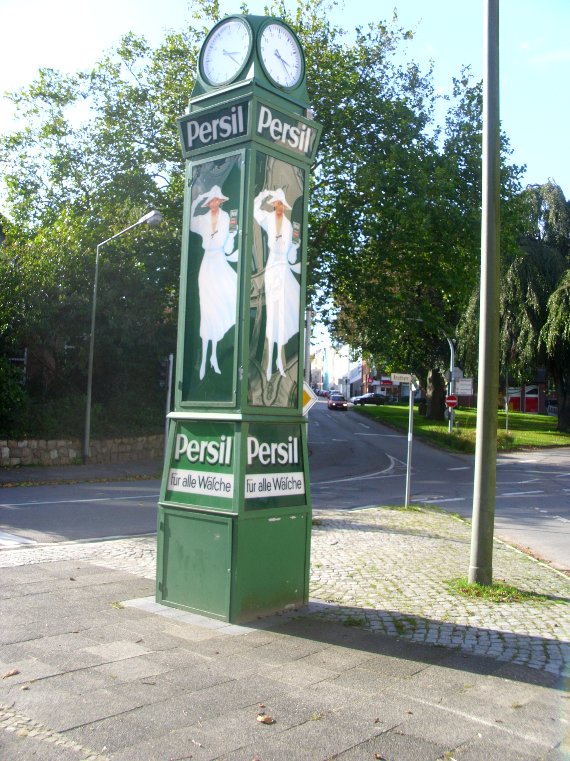 Persil-Uhr in Flensburg am Burgplatz an der Diakonissenanstalt